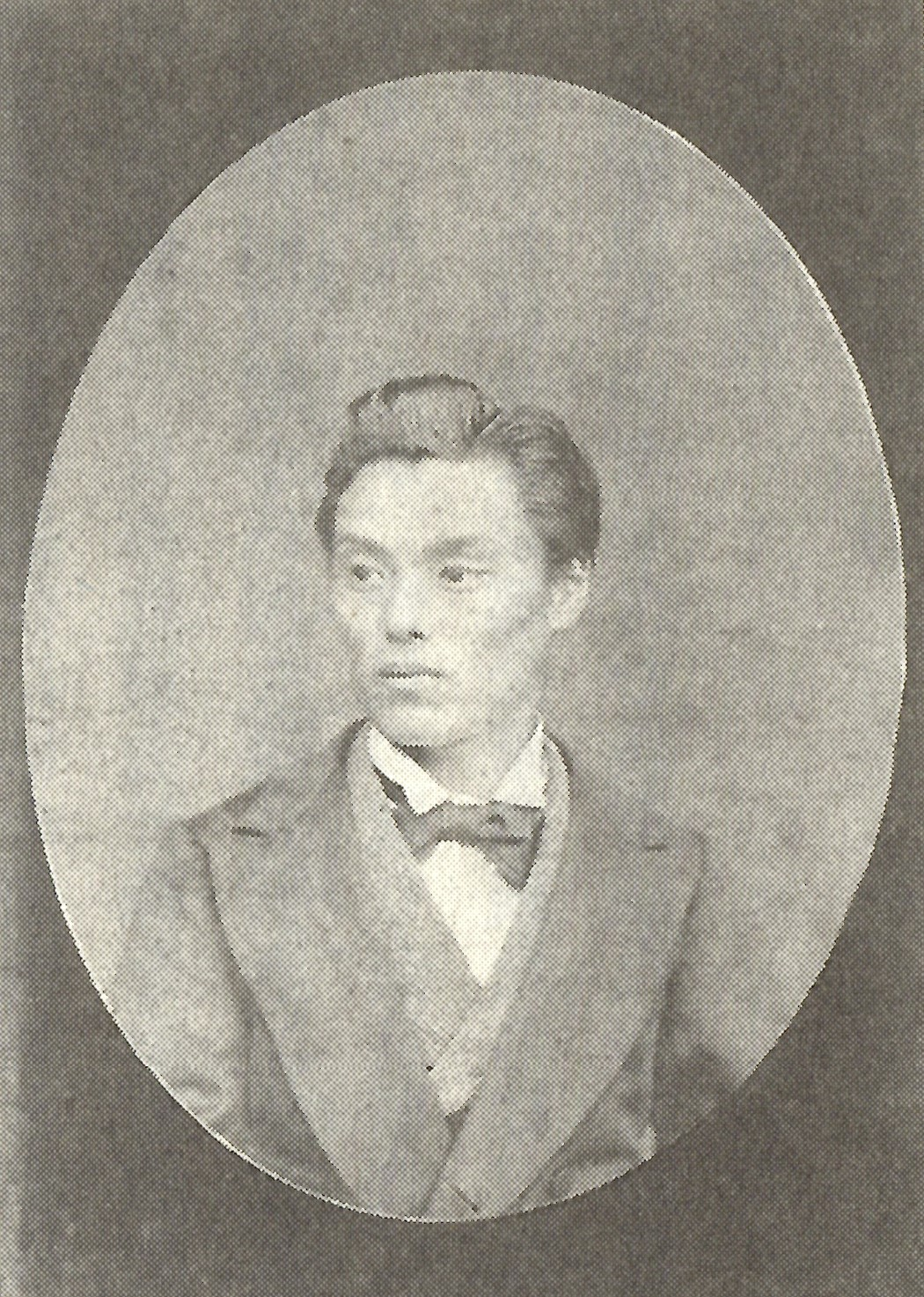 藤枝雅之の肖像写真。